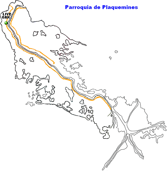 Live Oak, Louisiana.